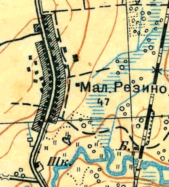 Топографическая карта Ленинградской области, квадрат О-36-13-А-а (Большая Пудость), деревня Малое Рейзино